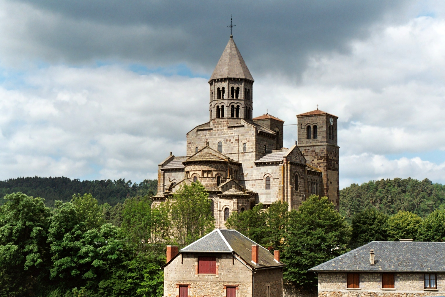 France - Auvergne - Puy-de-Dôme - Église de Saint-Nectaire